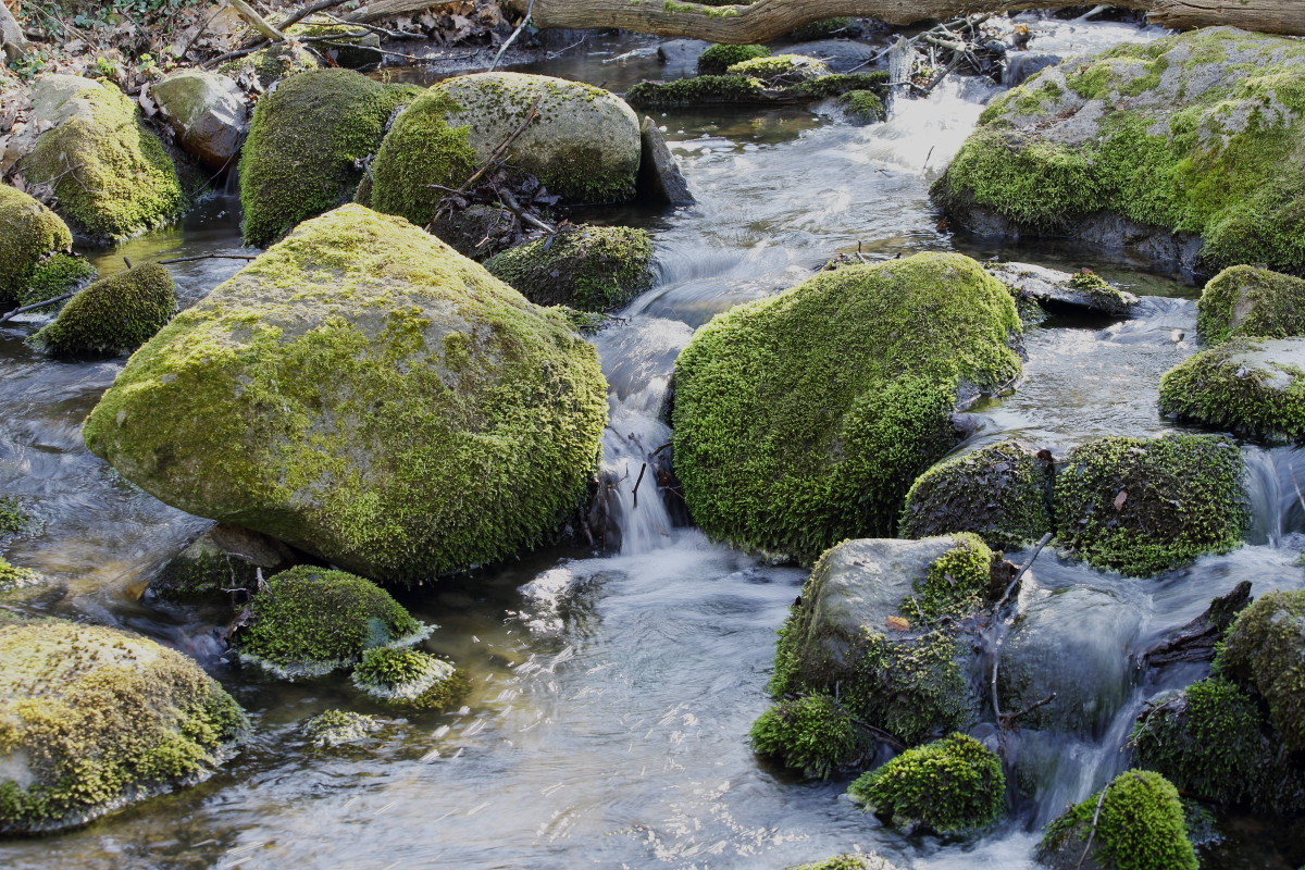 Bemooste Bachsteine in Burgtal bei Rambow